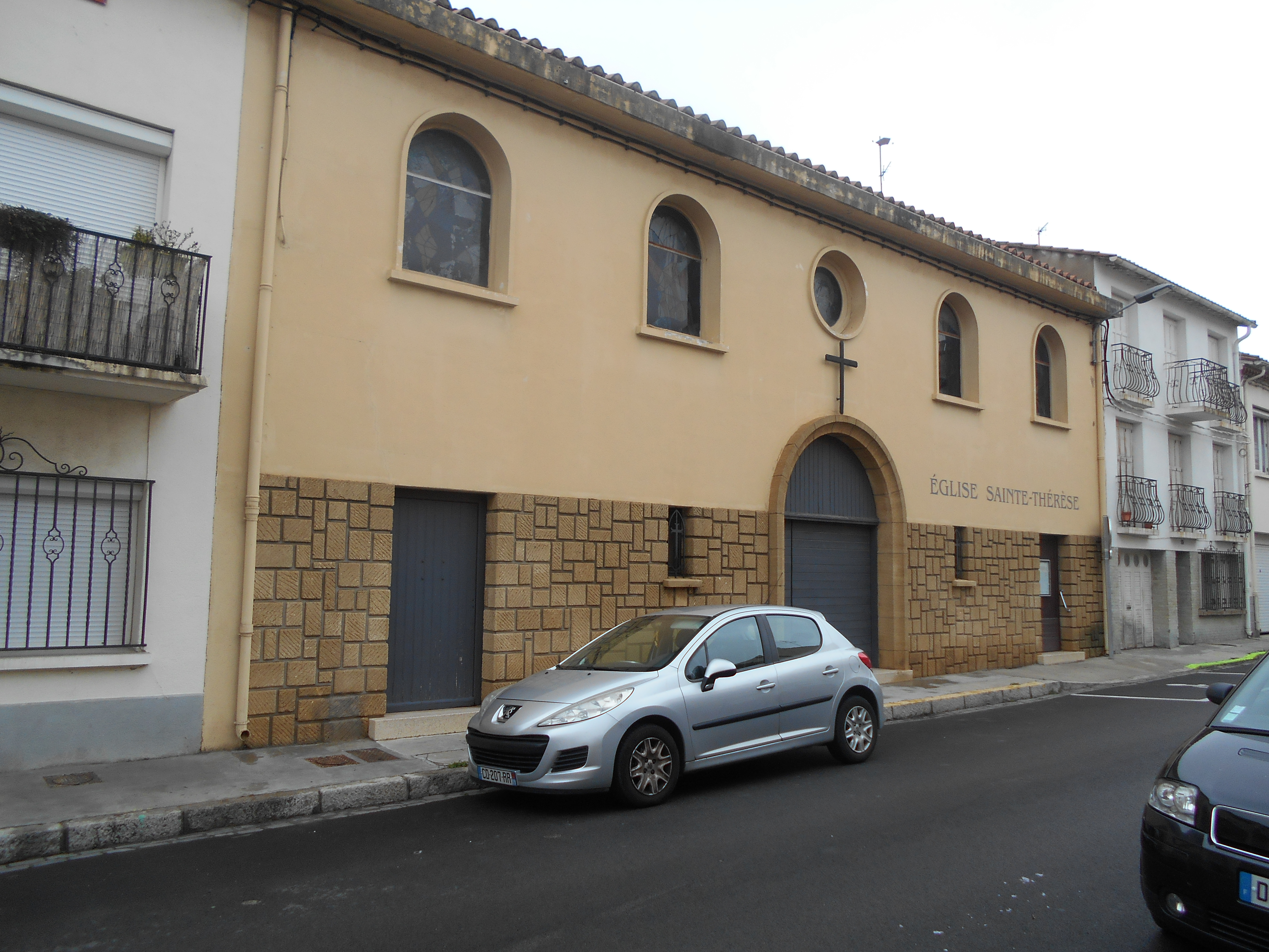 L'església parroquial de Santa Teresa del Nen Jesús